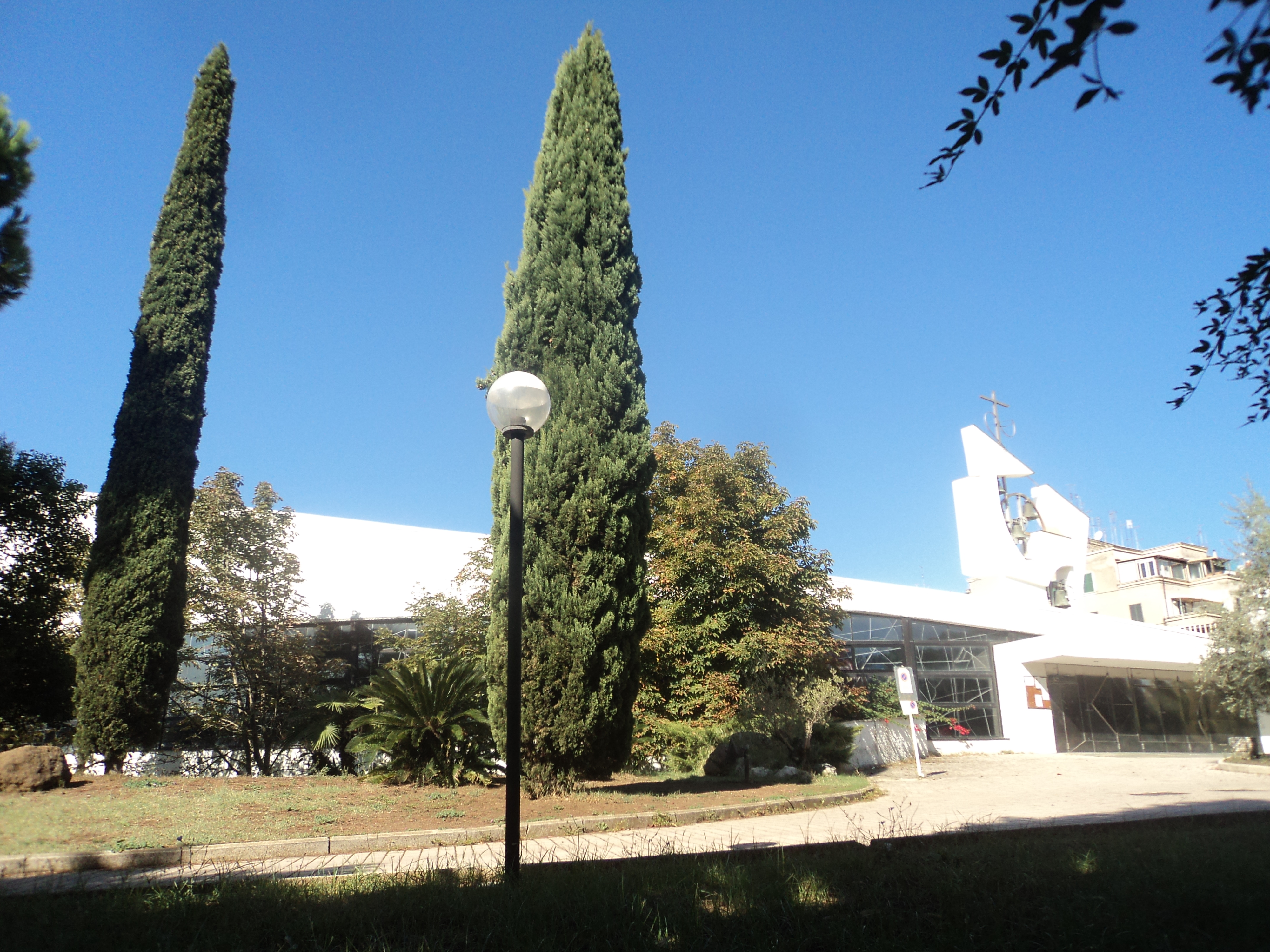 San Bernardo di Chiaravalle (Rome)